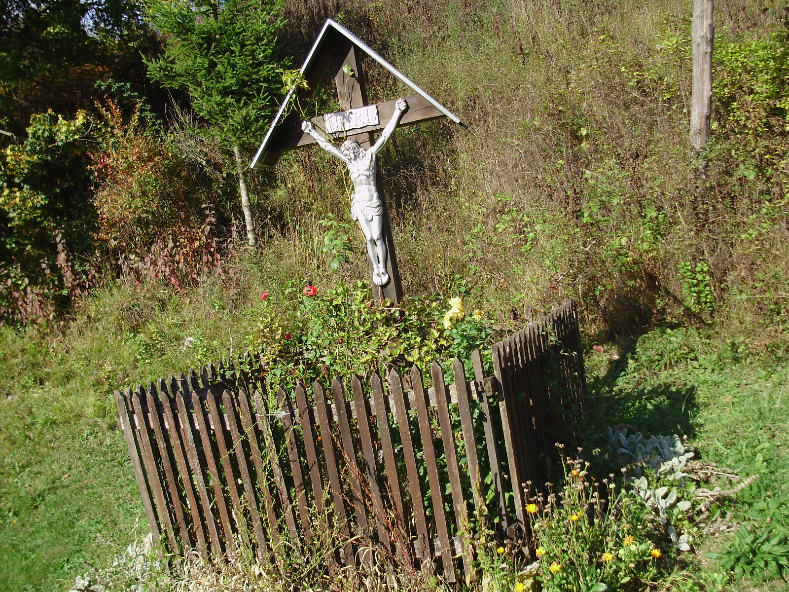 Tomašnica - Raspelo u Potočkom Selu